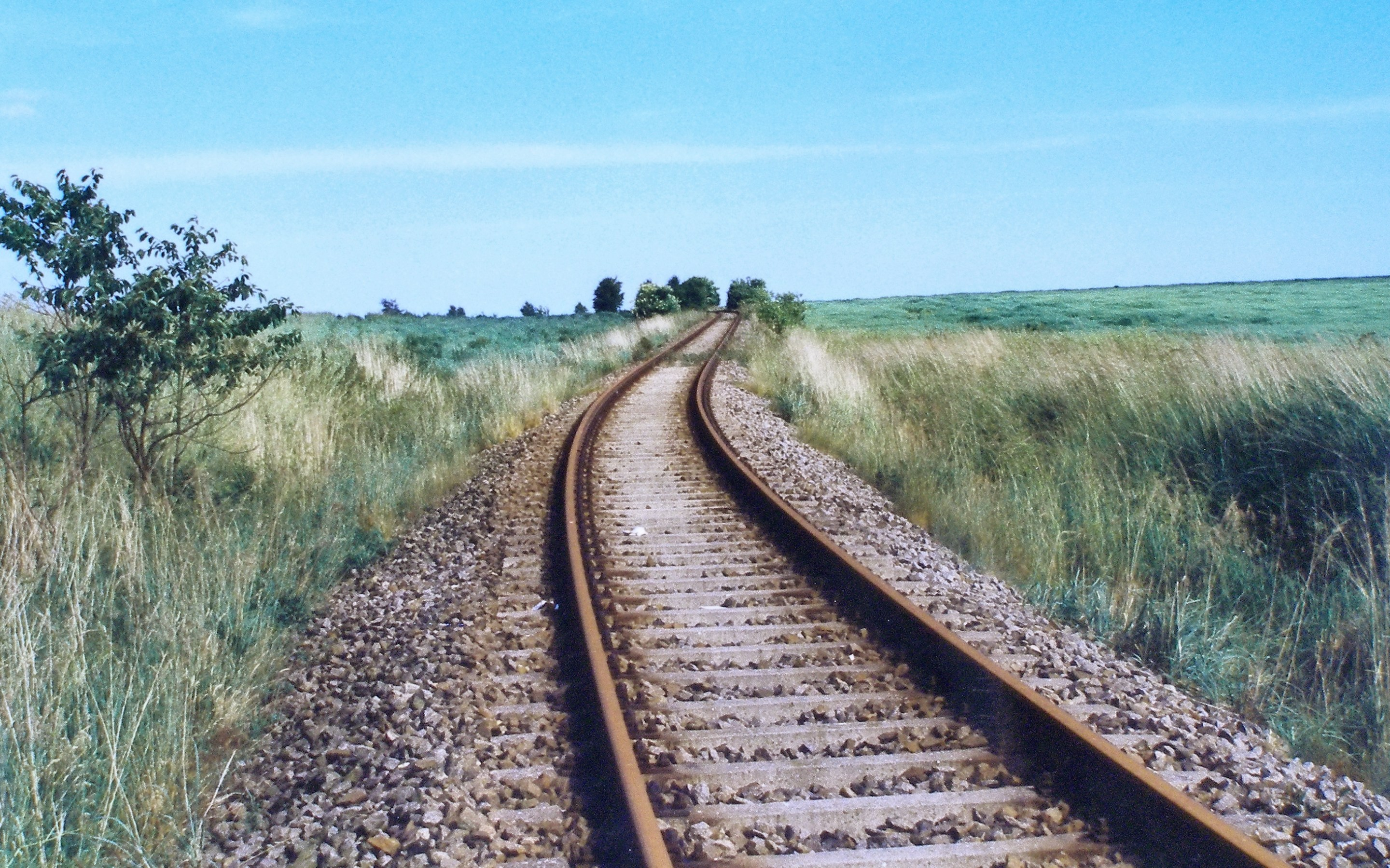 Stillgelegte Bahnstrecke von Querfurt zum sowjetischen Militärflugplatz Allstedt bei Lodersleben, 12. Juni 2000